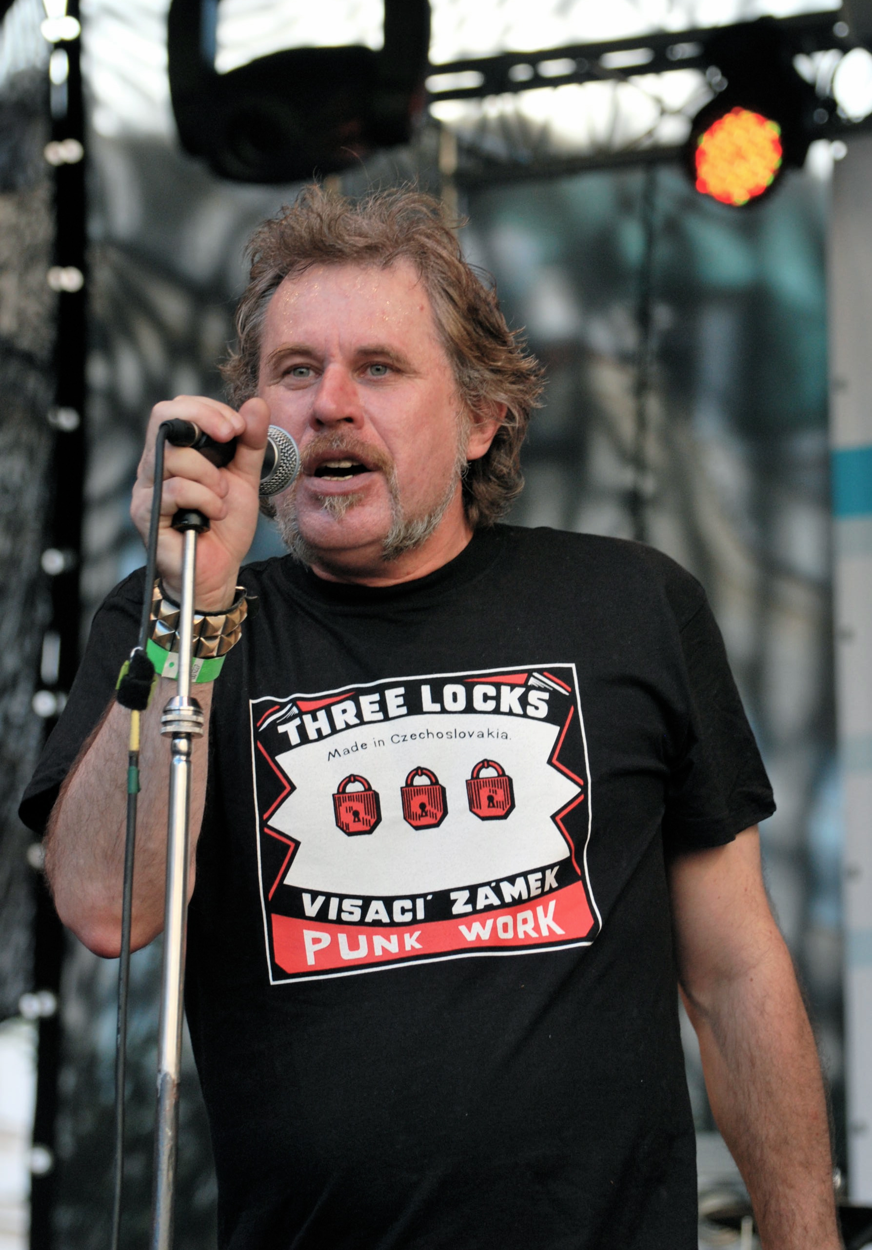 Jan Haubert, alias VZ1 na Václavském nám. 2011